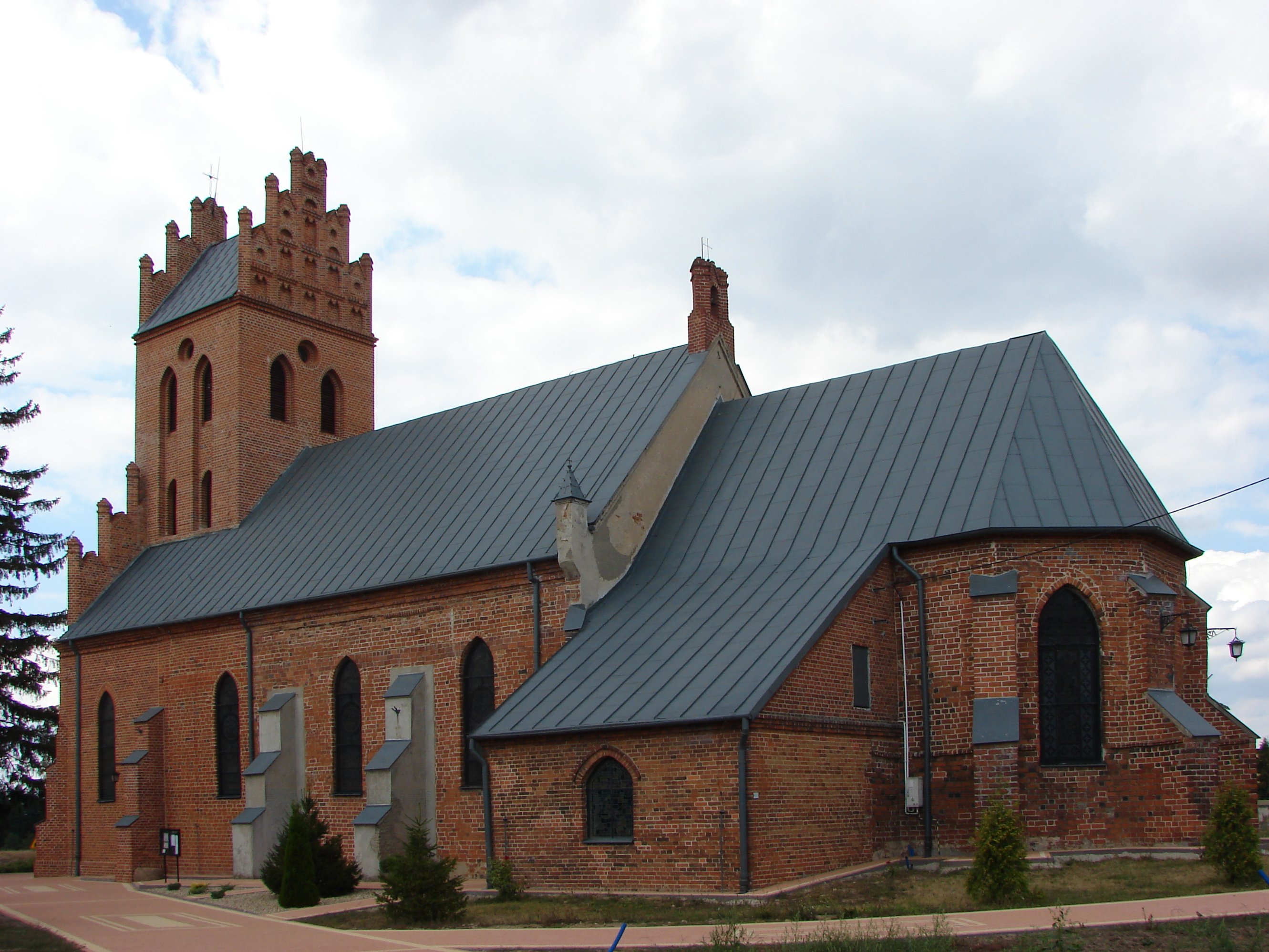 Zgłowiączka - rzymskokatolicki kościół parafialny p.w. Narodzenia NMP, XV, 1924 (wieża)